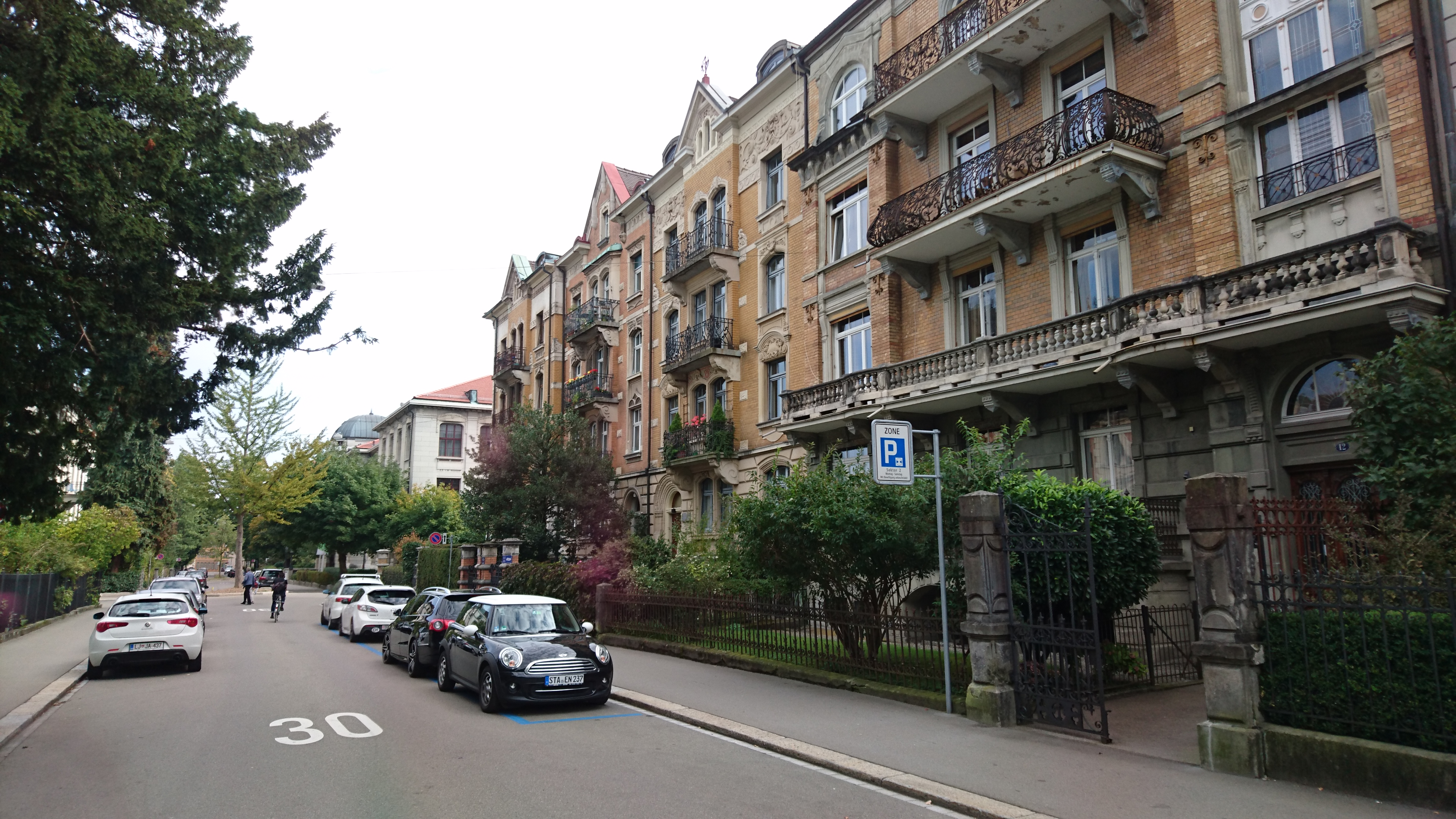 Blick auf die Notkerstrasse in Richtung Osten. In der Mitte, die Dächer von Kantonsschule am Brühl und die Kuppel der Vadiana-Bibliothek